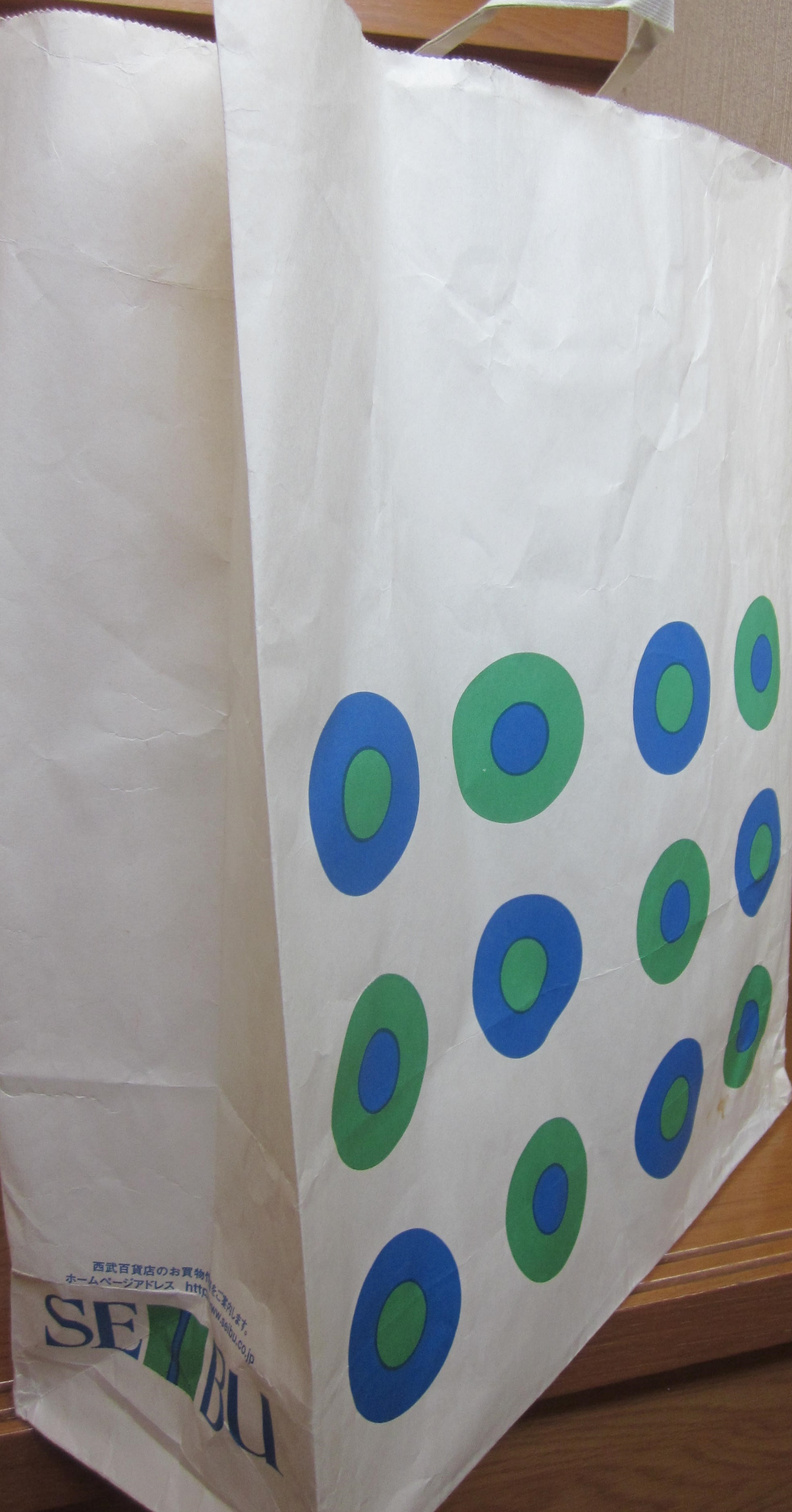 西武百貨店で使用されている買い物袋。